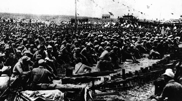 1945年，八路军山东军区渤海部队攻占利津县城后，举行祝捷大会。